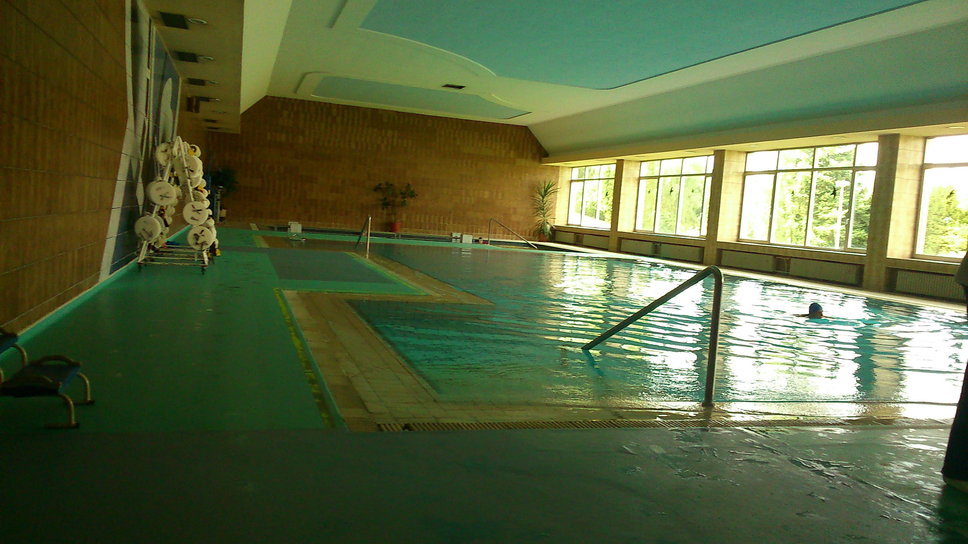 Plavecký a chodecký bazén